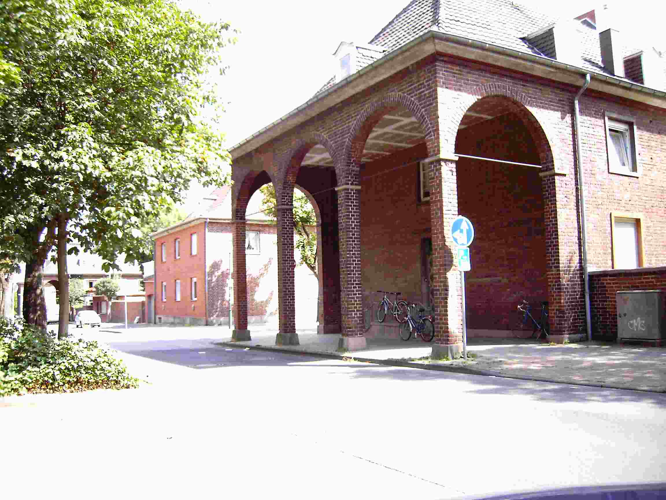 Grüngürtel (Düren) 3 own work papa1234 2006-08-13